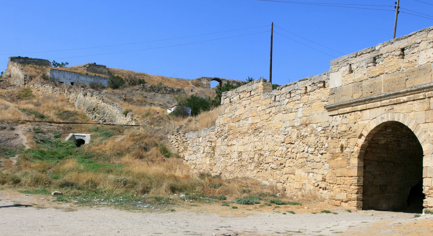 Крепостные ворота и остатки стен крепости Ени-Кале Крепостные ворота и остатки стен крепости Ени-Кале